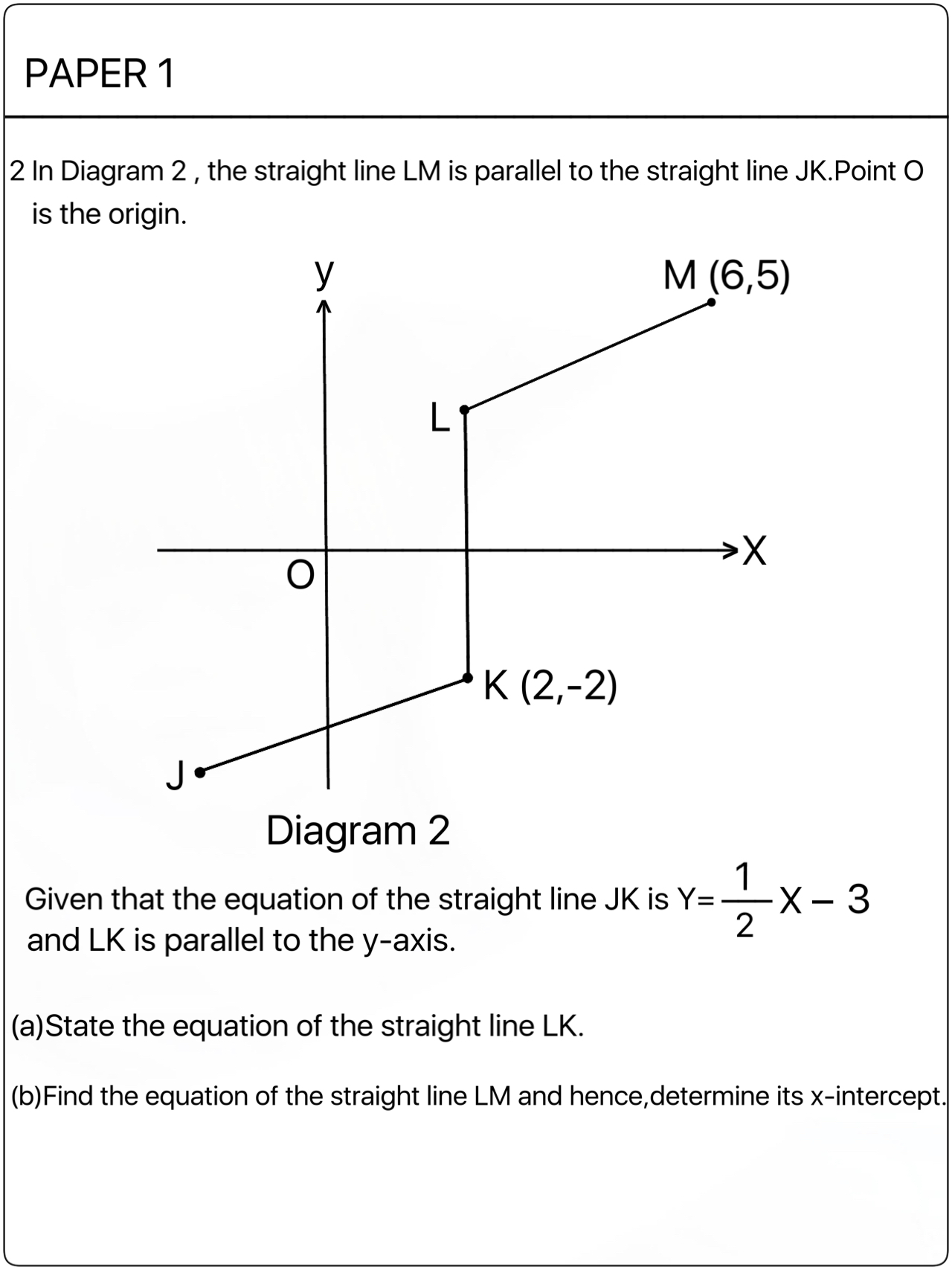 中文（中国大陆）: 一个高思维型数学题